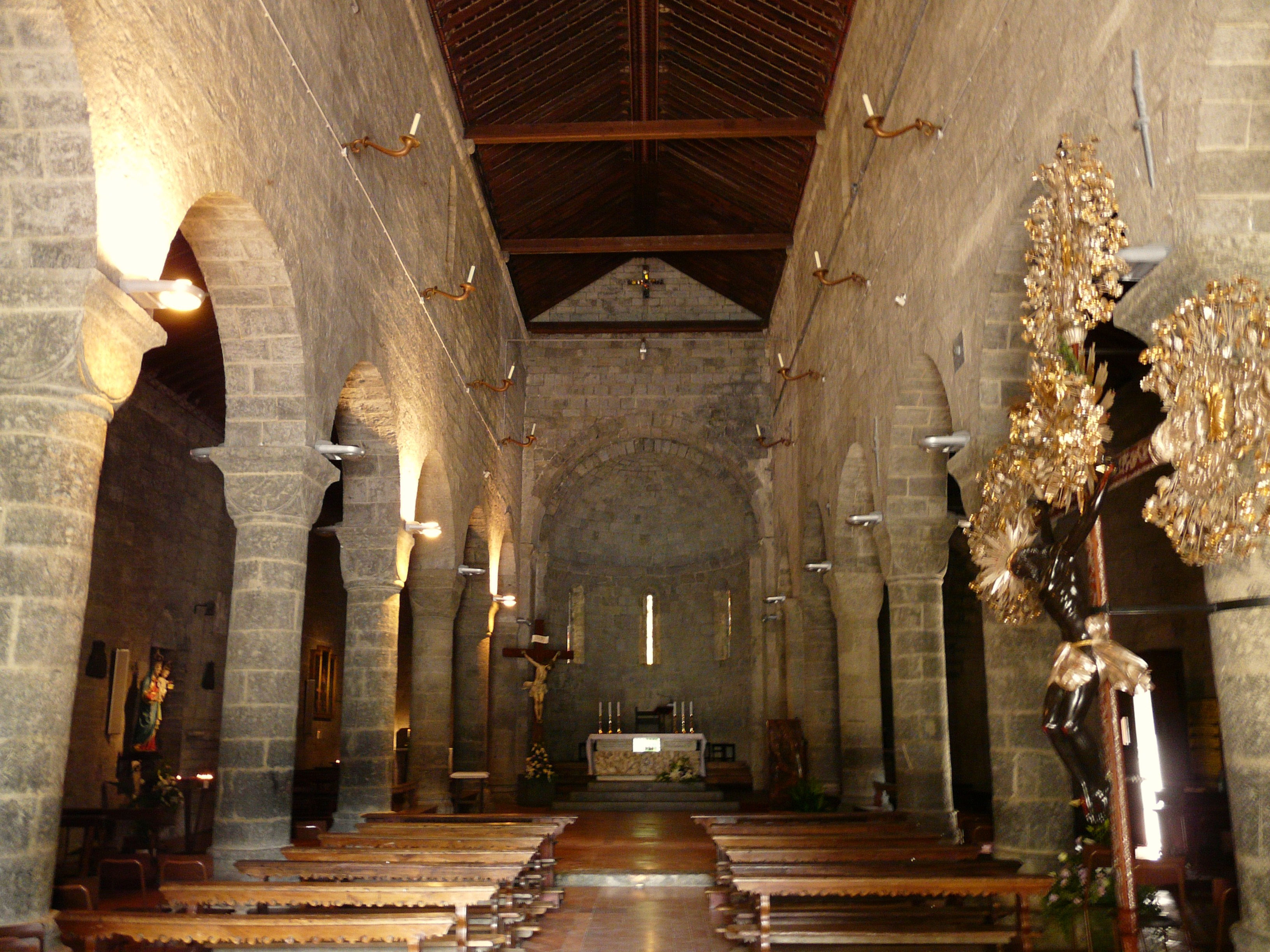 Navata centrale della chiesa di San Siro di Struppa, Genova, Liguria, Italia